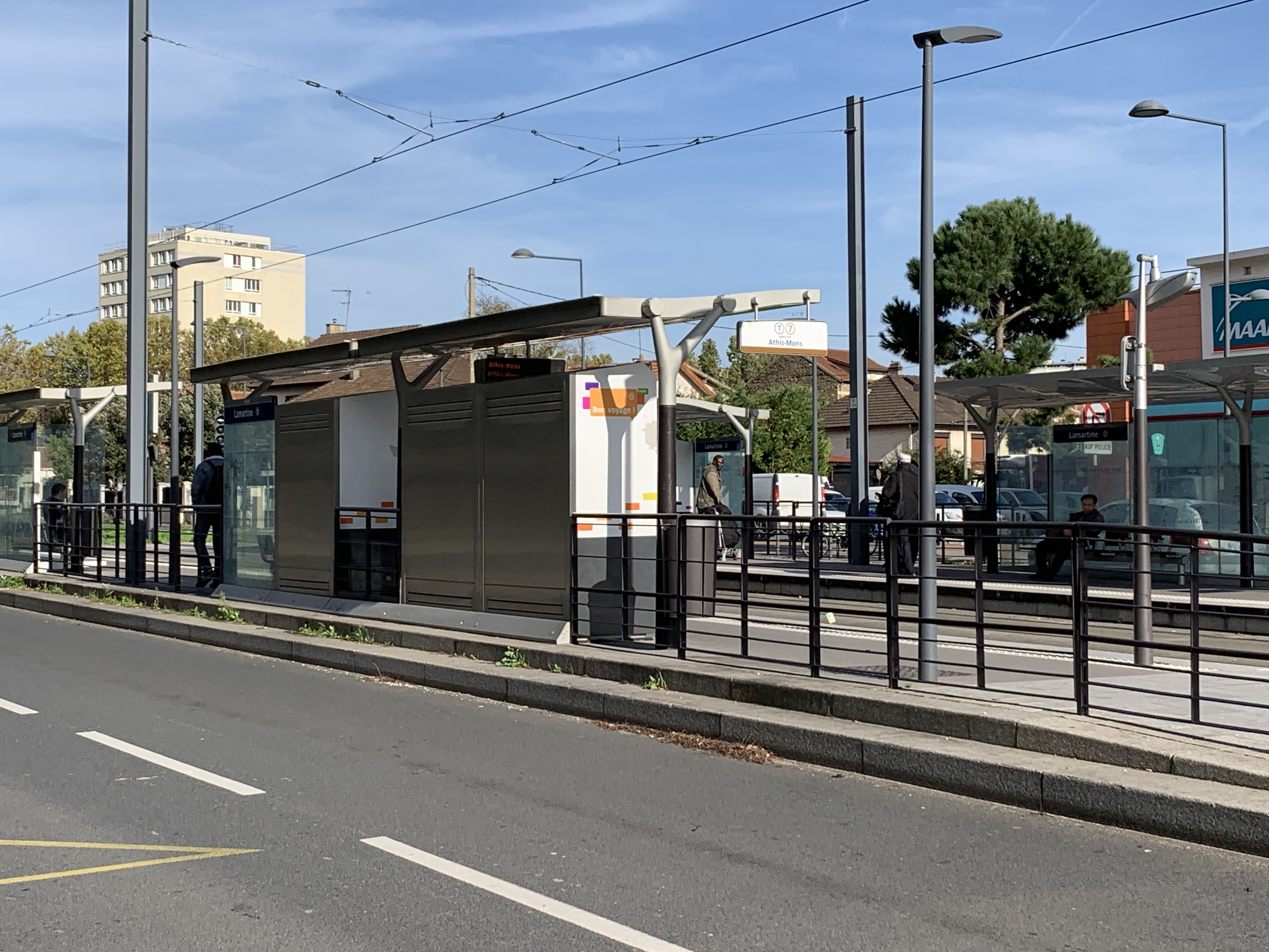 Station Lamartine de la ligne 7 du tramway d'Île-de-France, Villejuif.